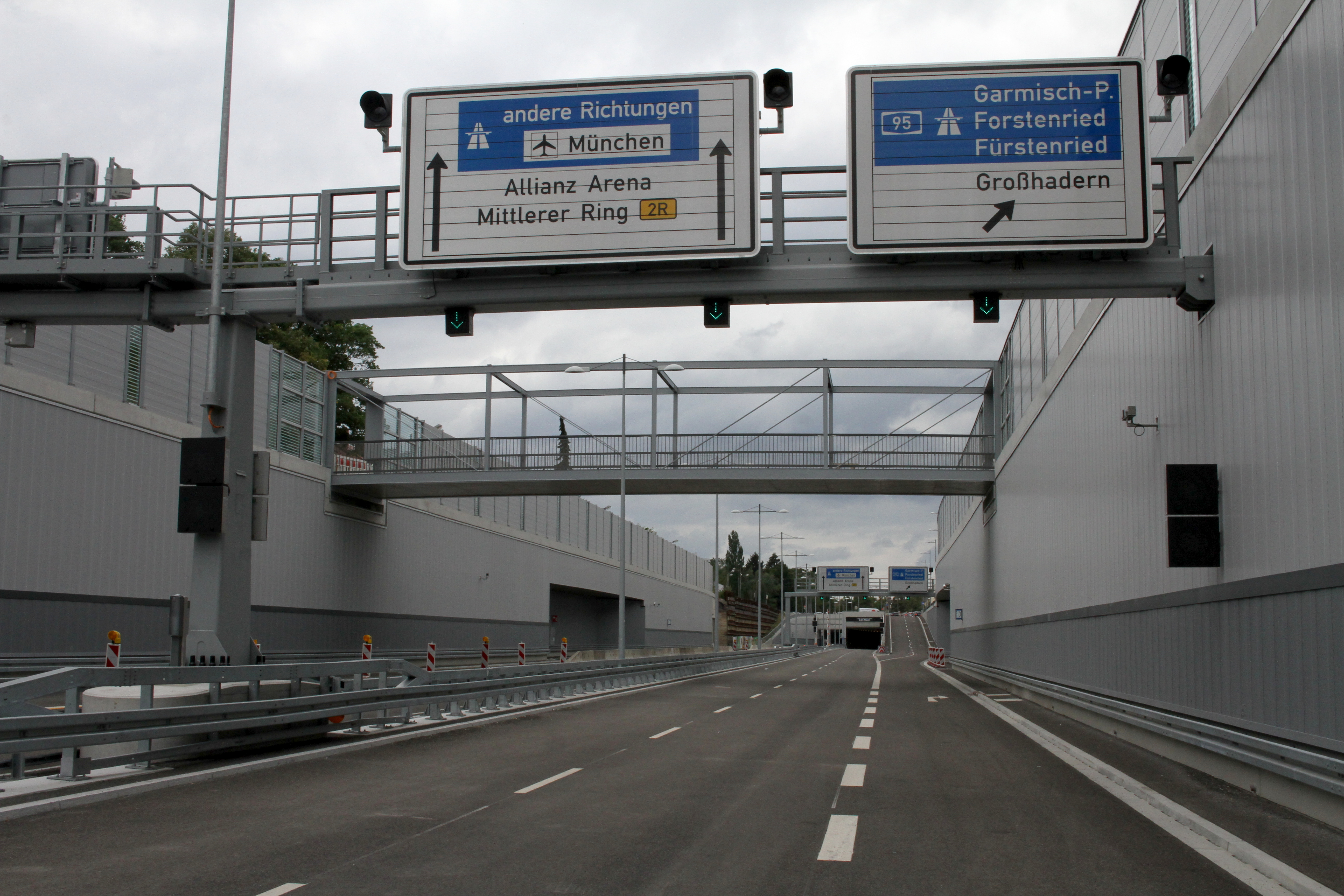 Grabbe-Brücke über den Heckenstaller-Trog des Mittleren Rings